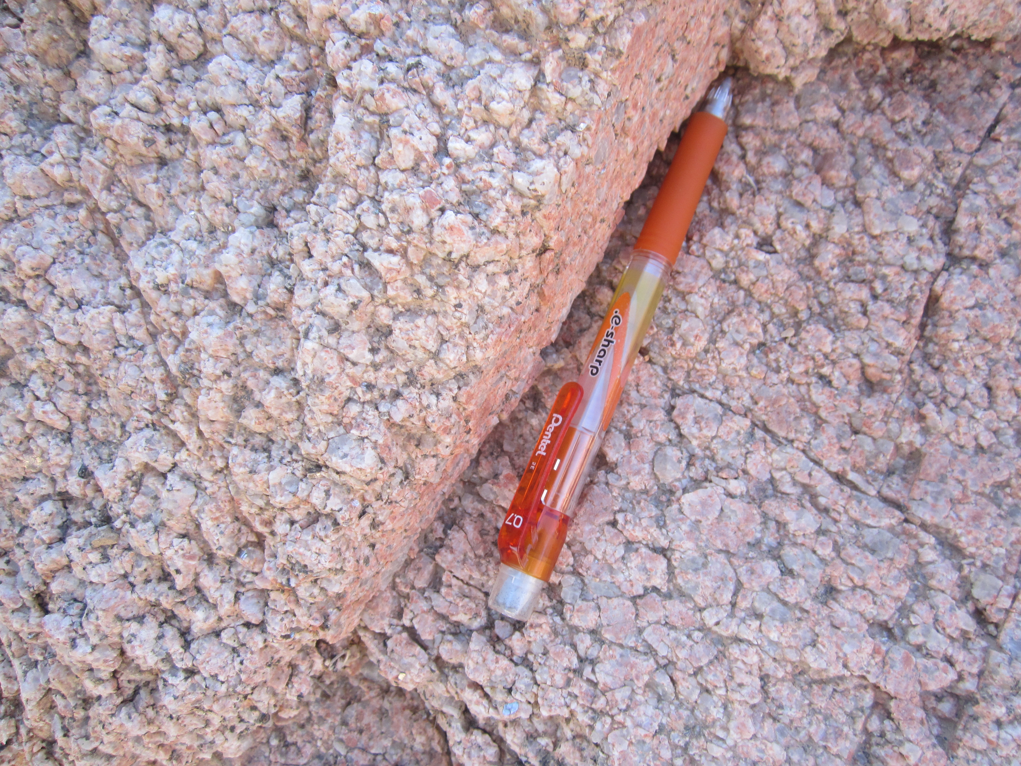 סלע גרניט בנחל יעל, ניתן להבחין בגבישים הגדולים הנובעים מהתקררות איטית של המינרלים.